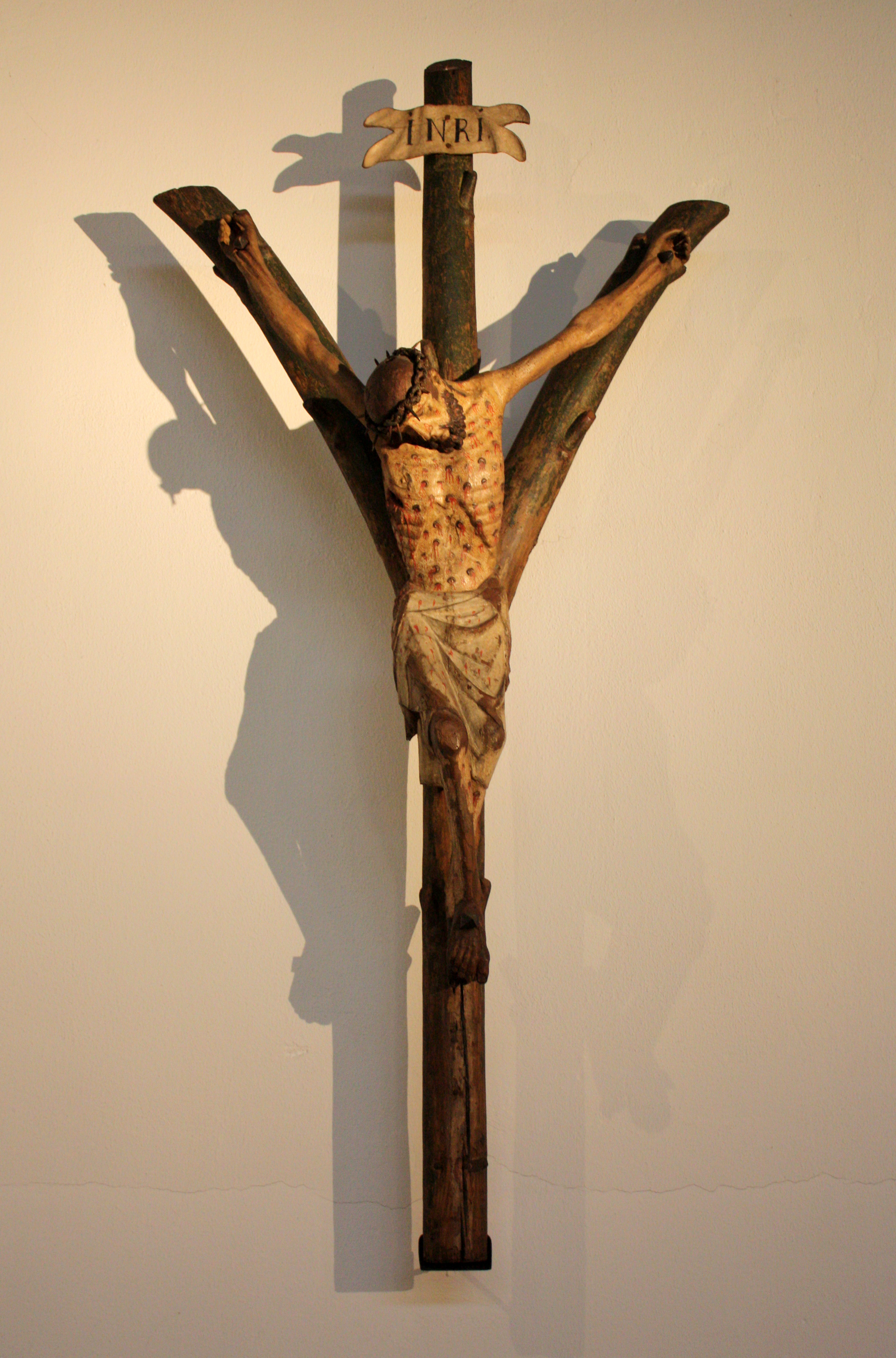 St. Johann Baptist Kendenich, Gabelkreuz aus dem 14. Jahrhundert